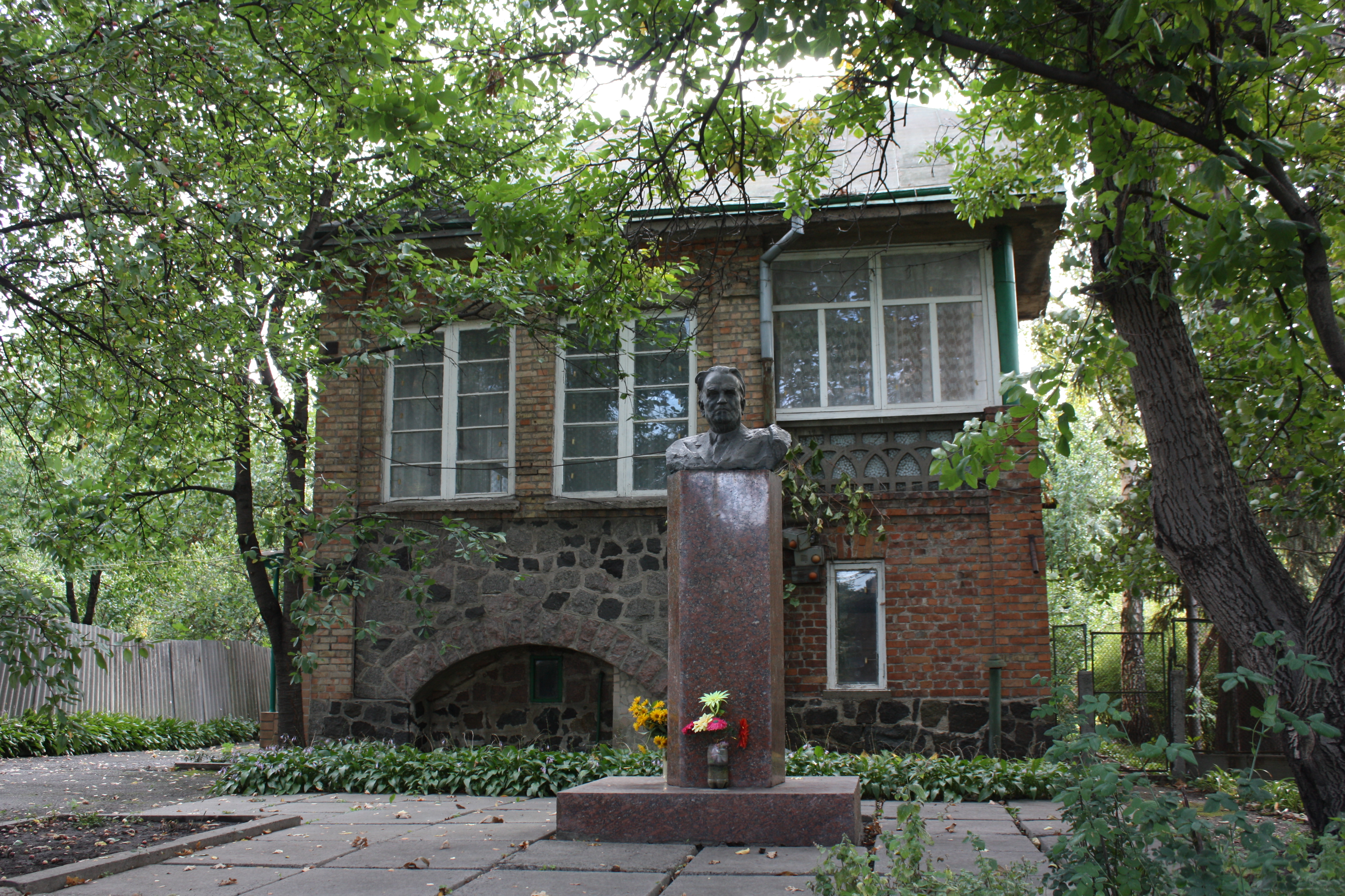 Музей-будинок Івана Ле у м. Городище (Черкаська обл.)